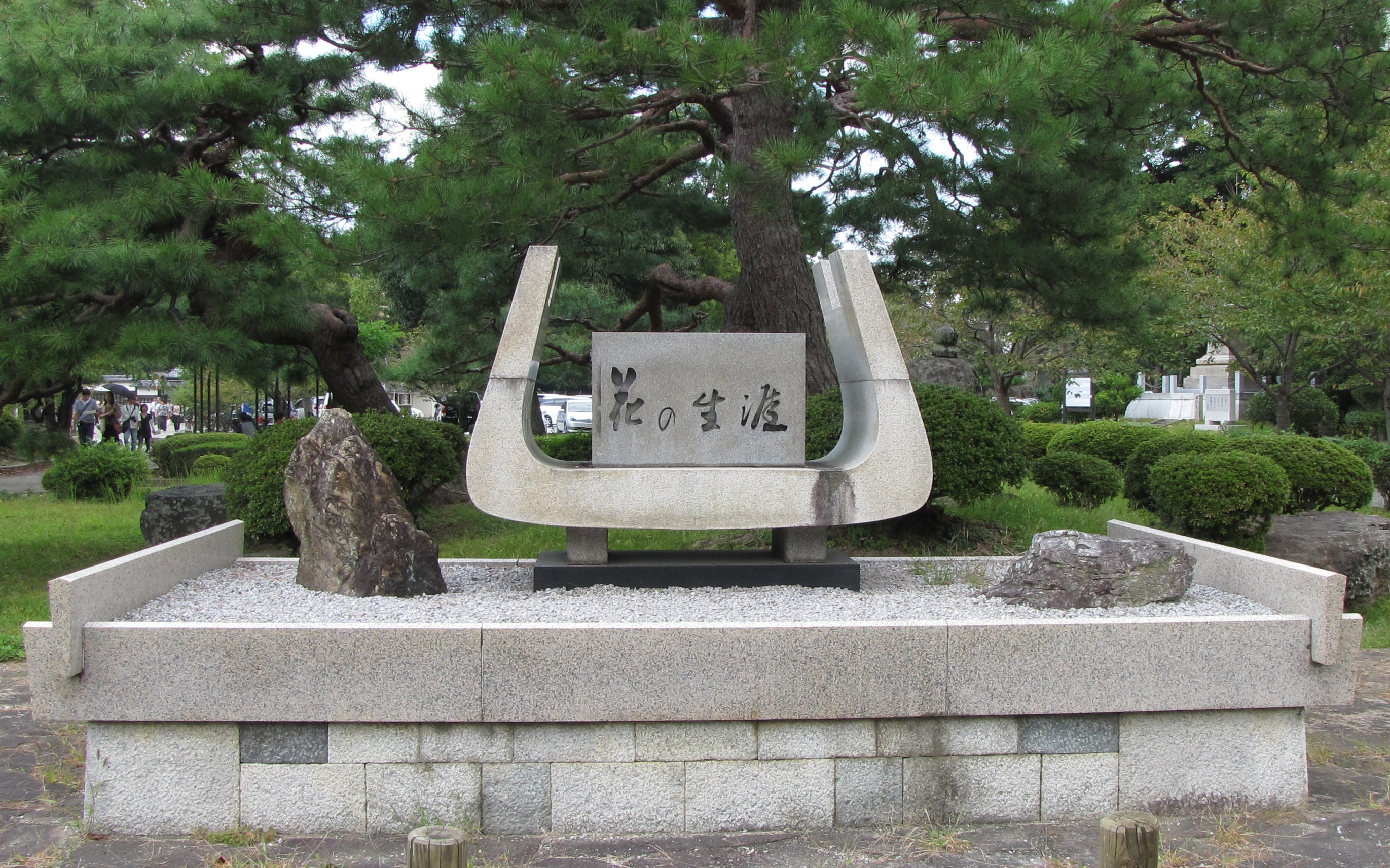 小説「花の生涯」の記念碑。滋賀県彦根市の彦根城金亀児童公園。